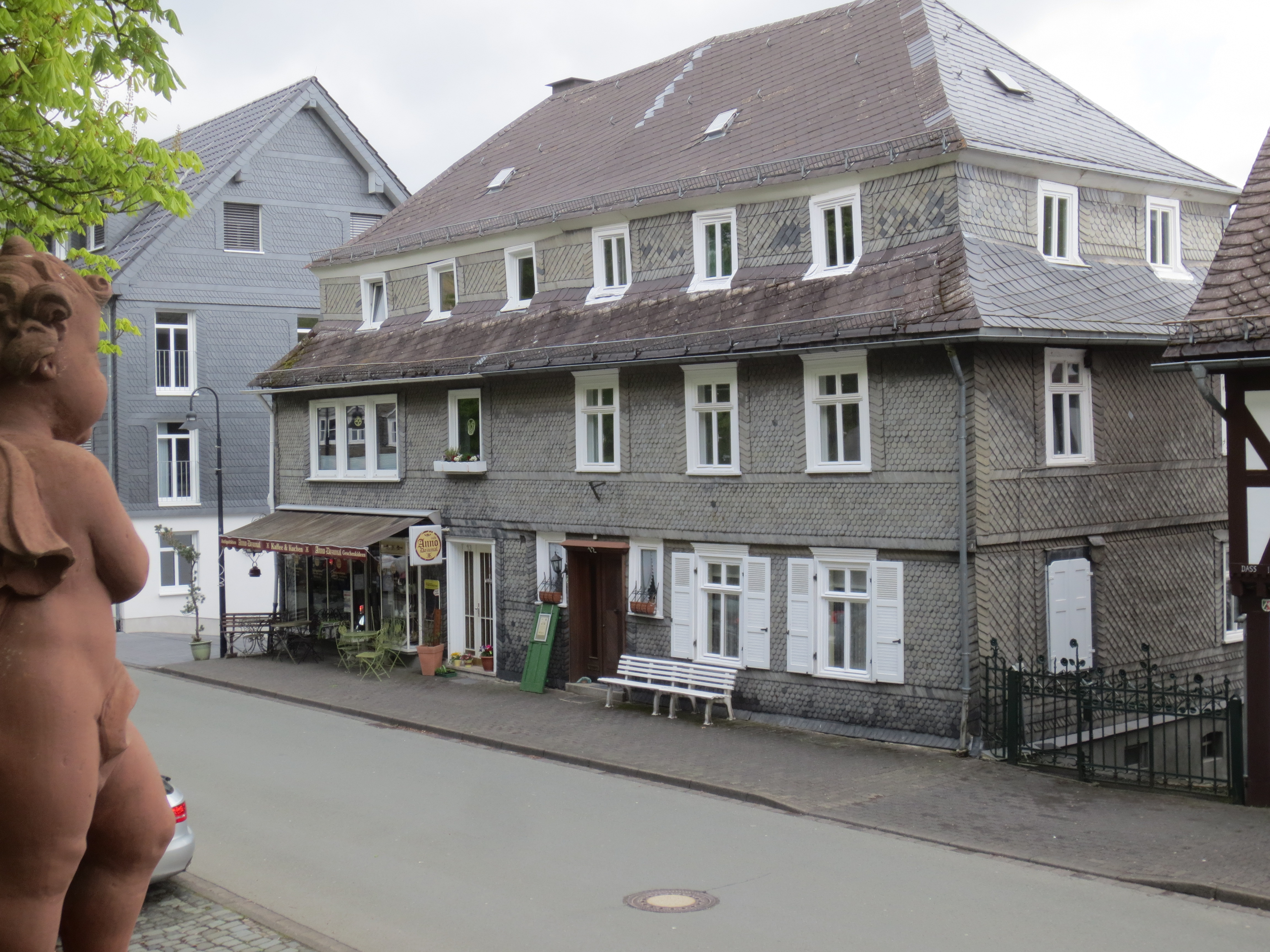 Doppelhaus des Fruchtschreibers Coridon, erbaut 1780.